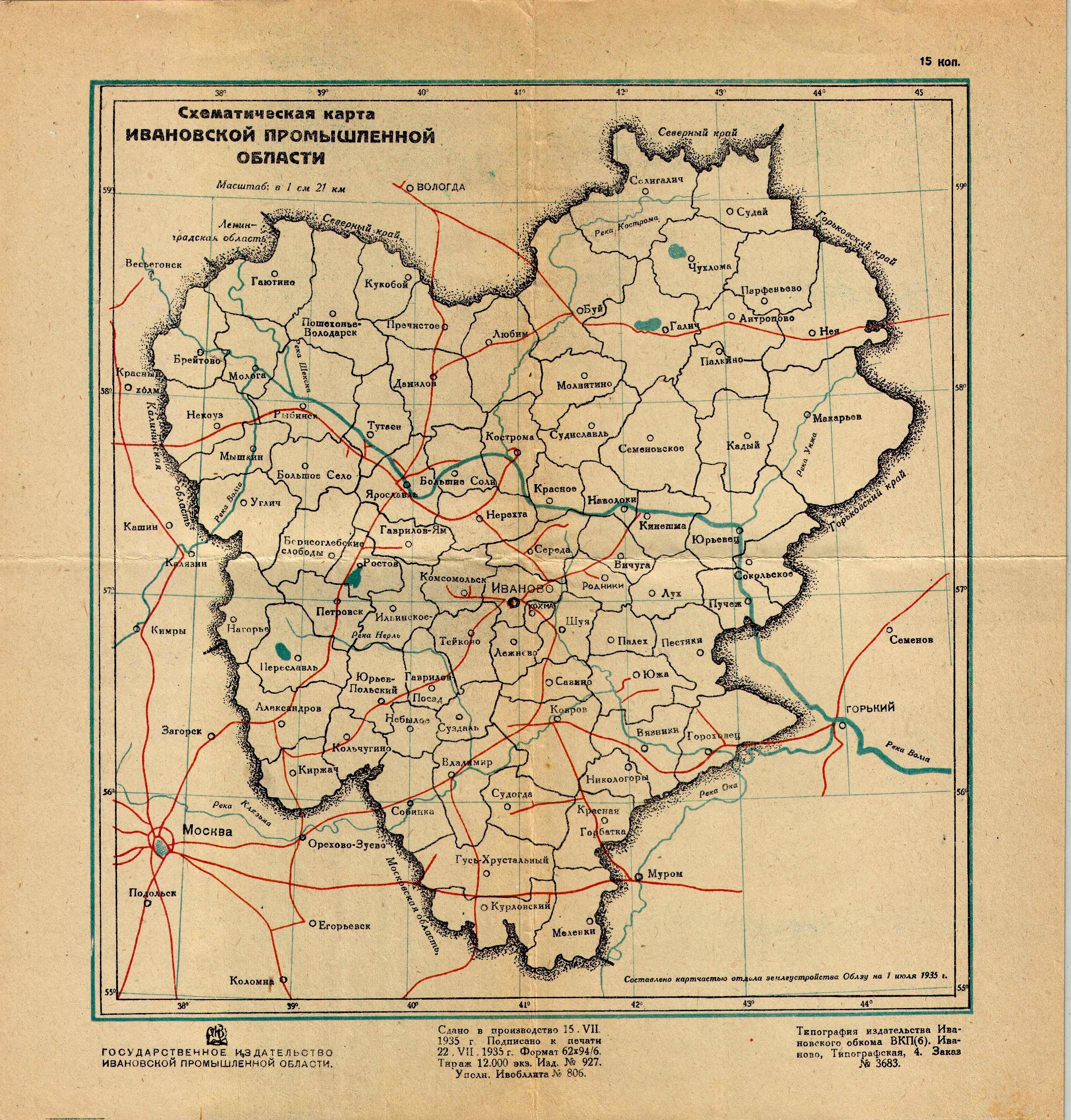 Схематическая карта Ивановской промышленной области. Масштаб: в 1 см 21 км